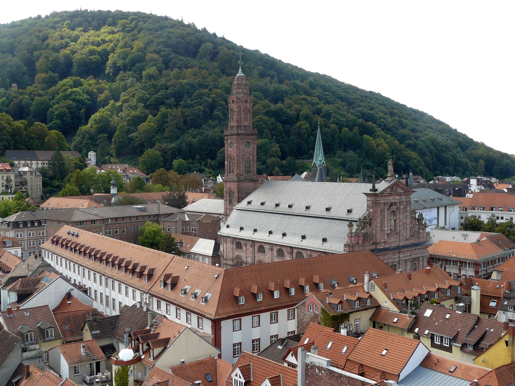 Heidelberger Jesuitenkirche und -kolleggebäude vom Turm der Heiliggeistkirche aus gesehen